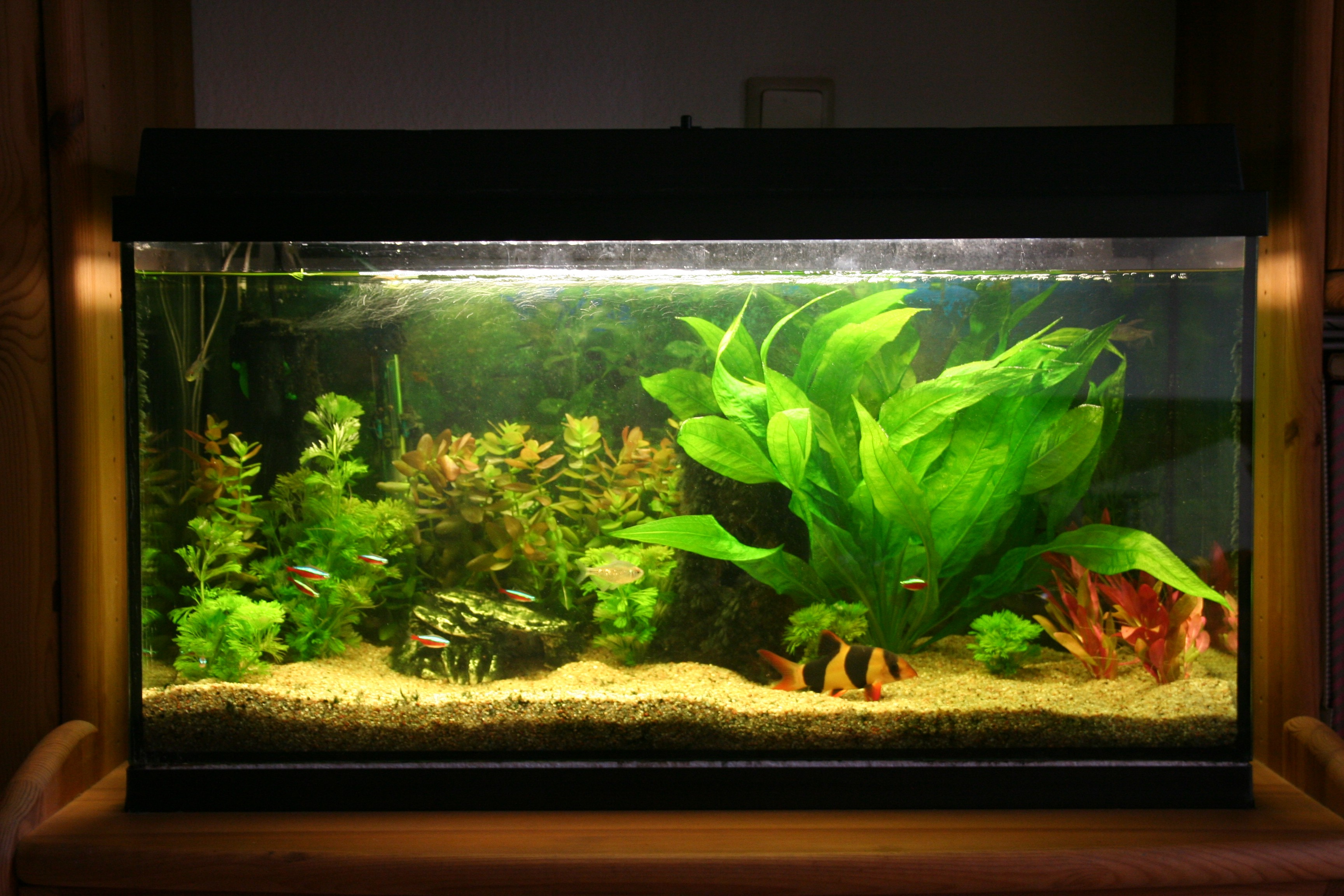 Süsswasseraquarium mit Prachtschmerle und Neon- und Brilliantsalmlern